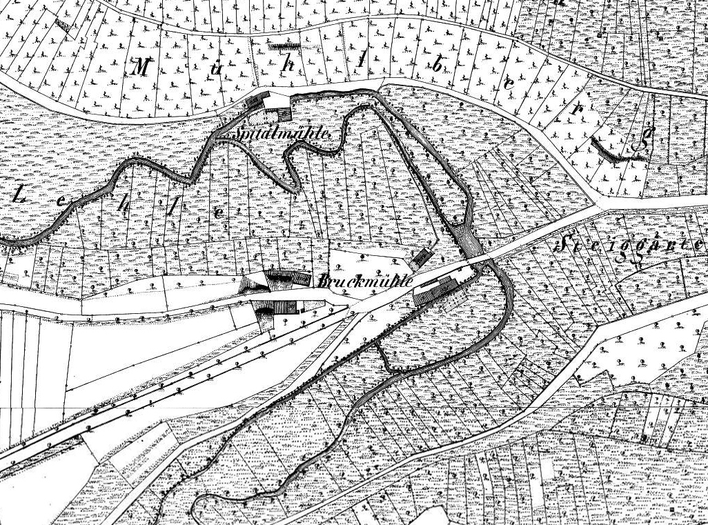 Bruck- und Spitalmühle bei Markgröningen auf der württembergischen Urflurkarte von 1831/32. Bei der Bruckmühle das Untere Schafhaus.